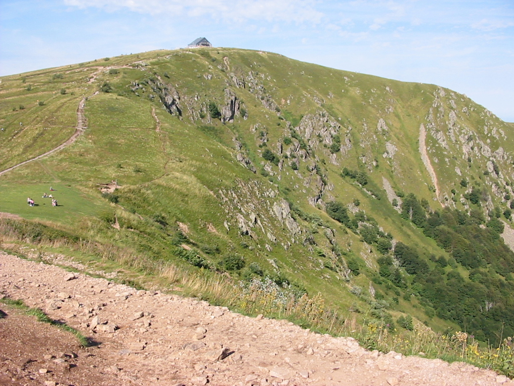 Le Hohneck (Massif des Vosges) Photo personnelle, prise le 23 août 2004. Licence : GFDL Christian Amet